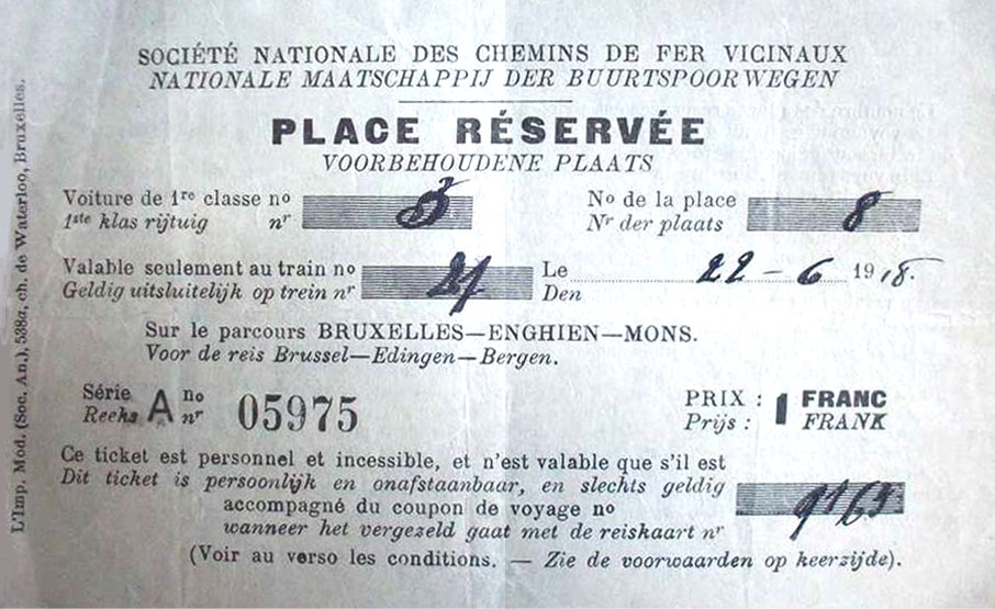 Reserveringsbiljet van de NMVB/SNCV voor buurtspoorweg langeafstands stoomtramdienst Brussel - Edingen - Mons. De lange aftands stoomtramdiensten werden in en kort na de Eerste Wereldoorlog ingelegd wegens beschadigingen van het hoofdspoornet en wegens capaciteitsbeperkingen op het hoofdspoornet wegens het gebruik voor militaire doeleinden.